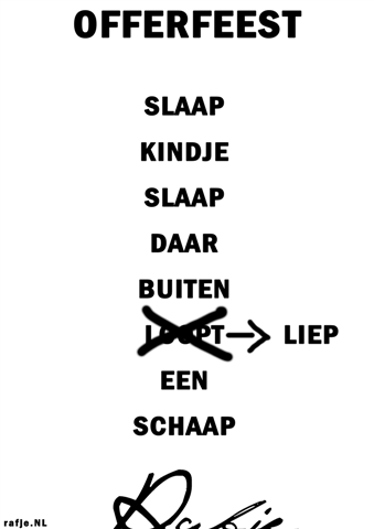 Rafje over het Offerfeest